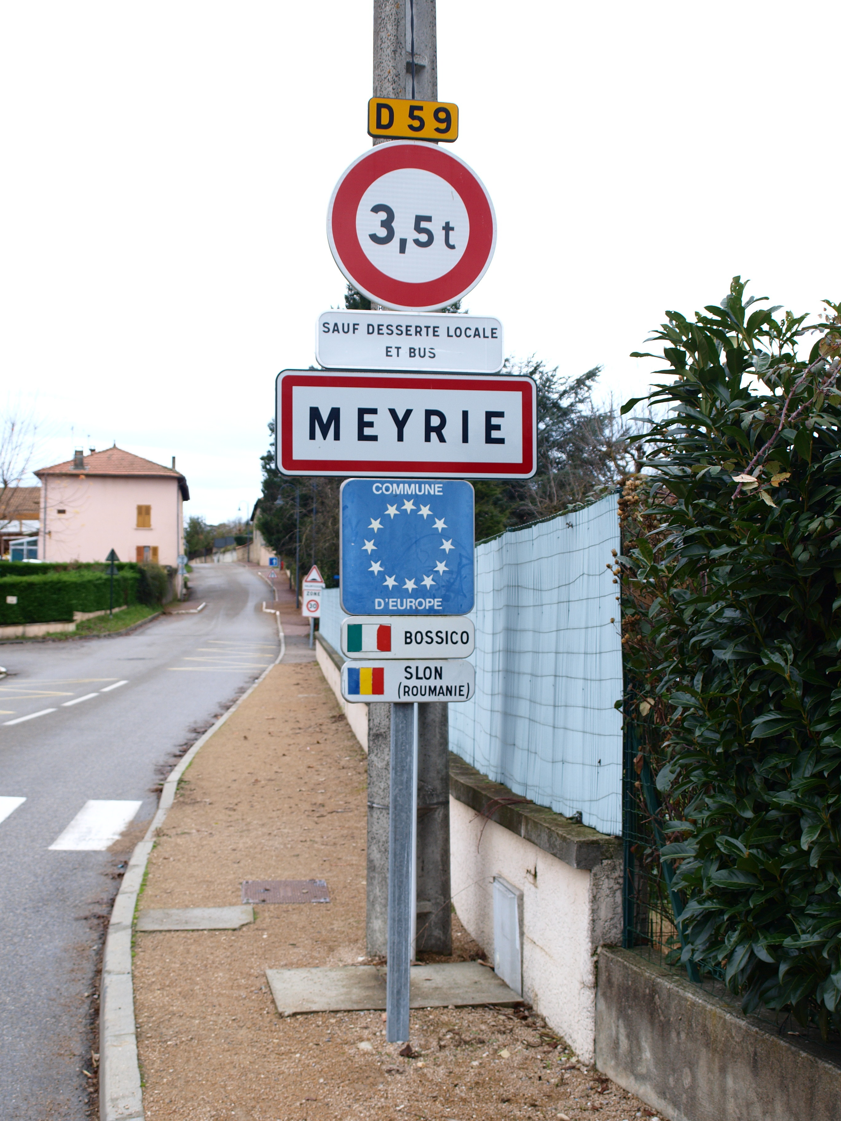 Meyrié (Isére, France)